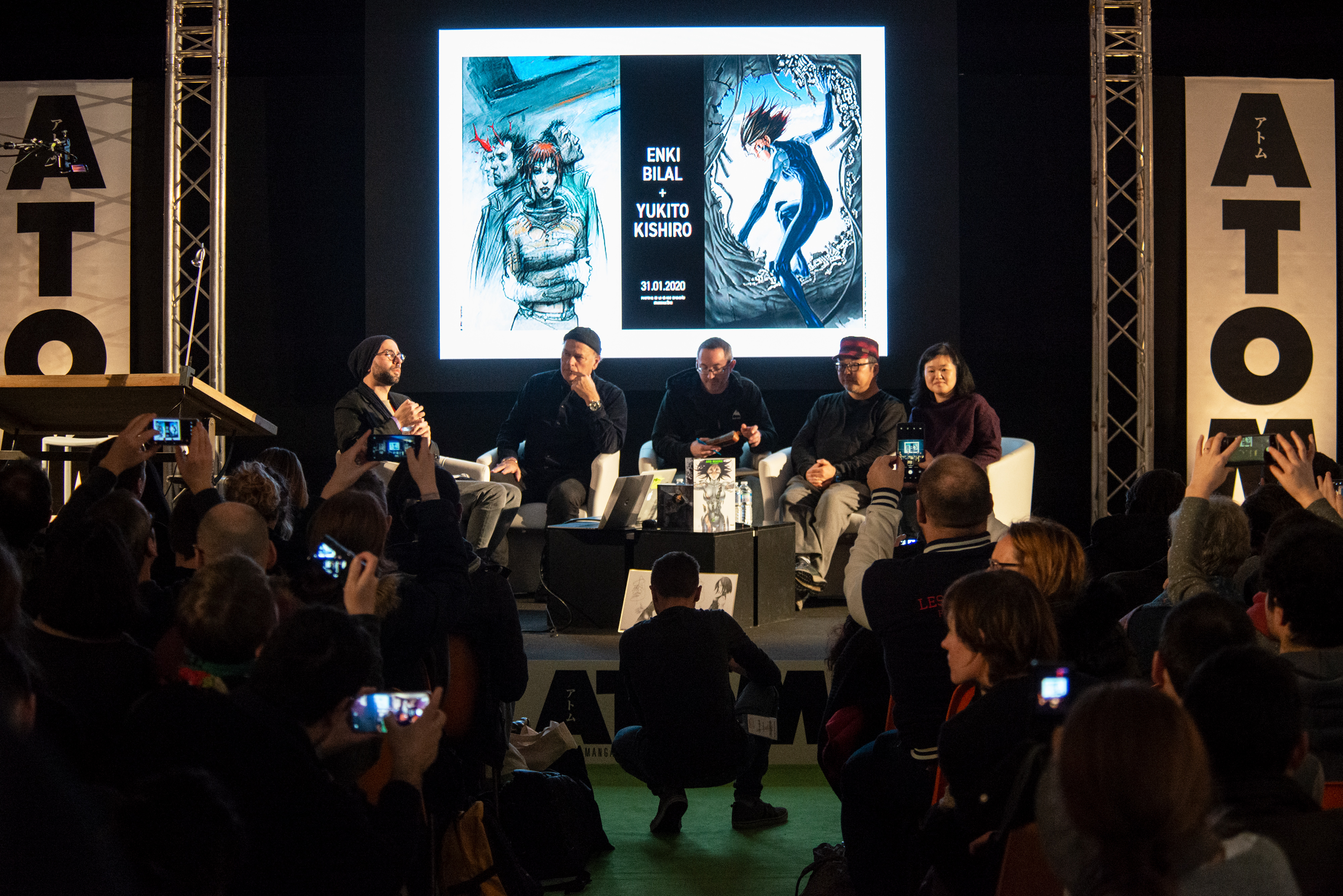 Rencontre Enki Bilal & Yukito Kishiro, Espace Manga, Festival International de la Bande Dessinée d'Angoulême 2020.